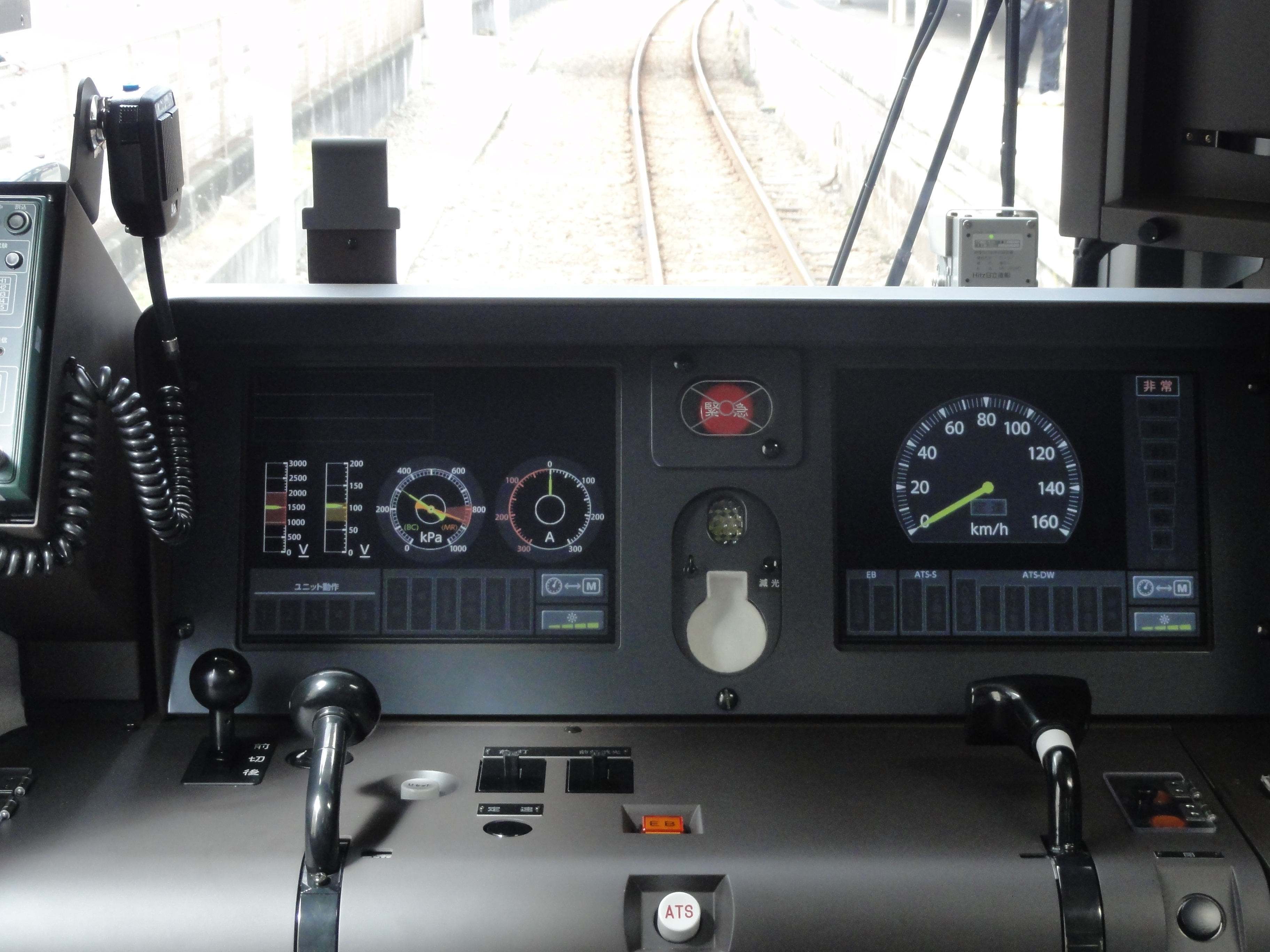 JR西日本の車両では当形式が初採用となったグラスコックピット構造の運転台。